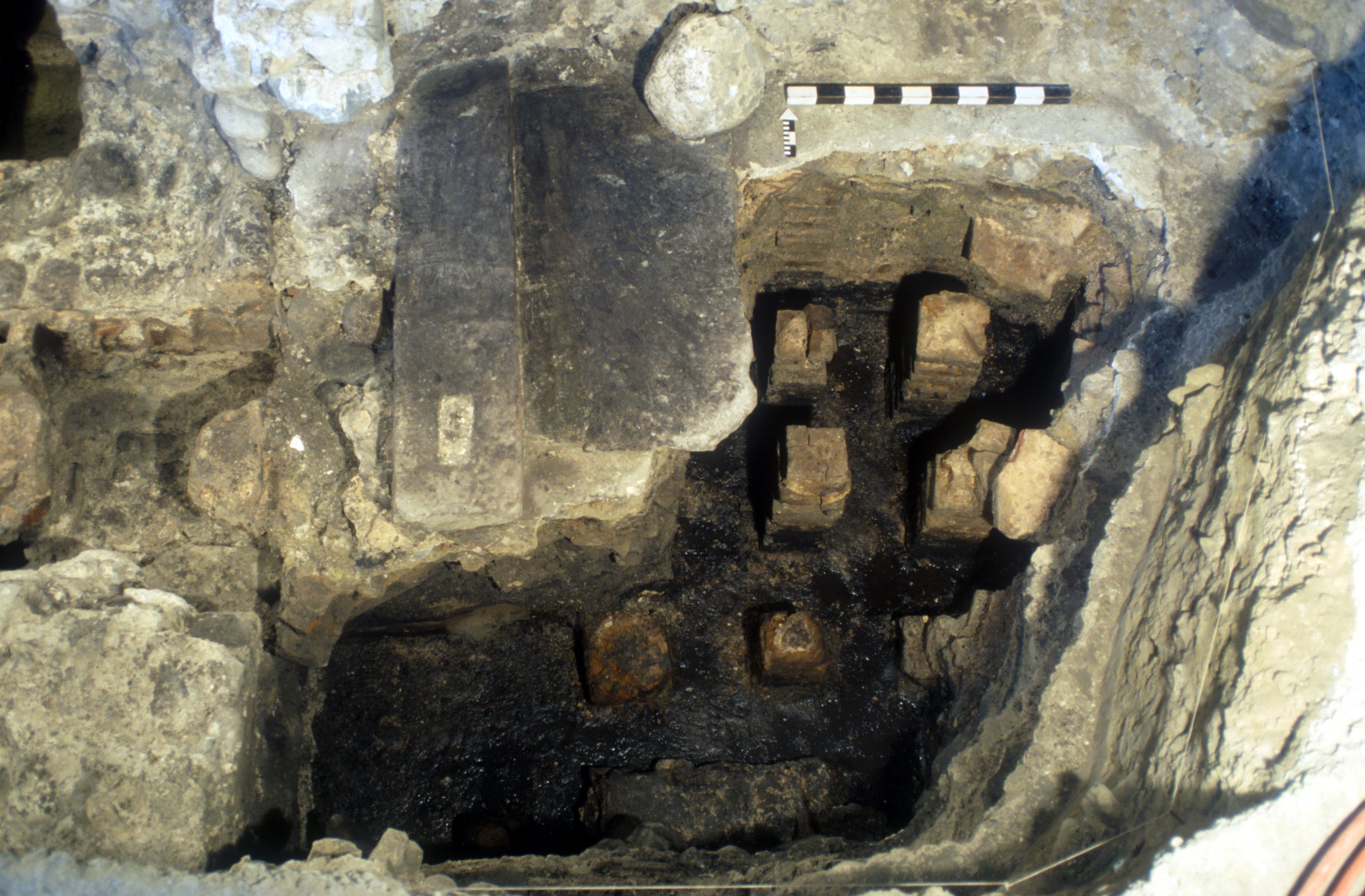 Arbon: ausgegrabene Bodenheizung (Hypokaust) der Thermenanlage unter der Martinskirche